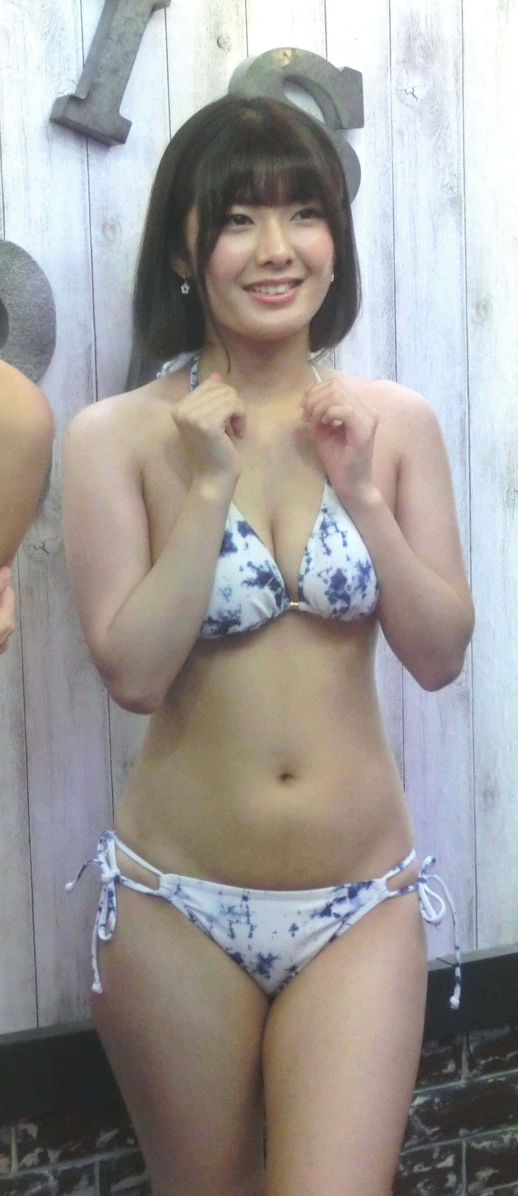 秋葉原おっぱいの日撮影会